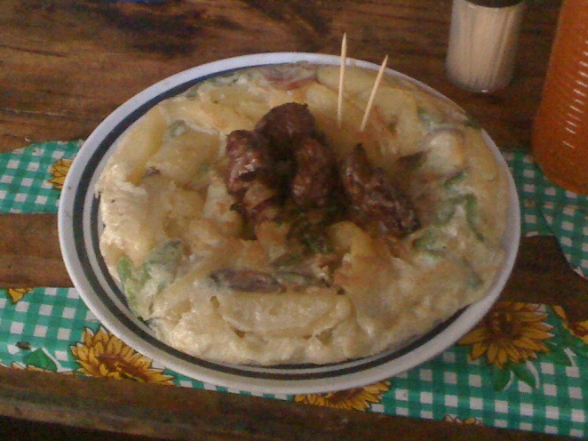 Chipsi Mayai